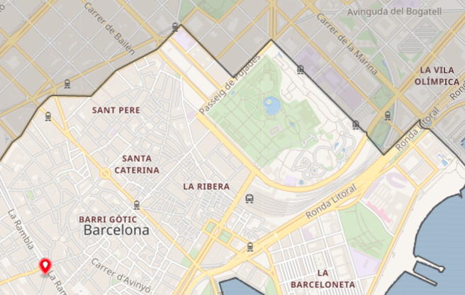 Sant Pere, Santa Caterina i la Ribera (plànol), part de la Ciutat Vella.